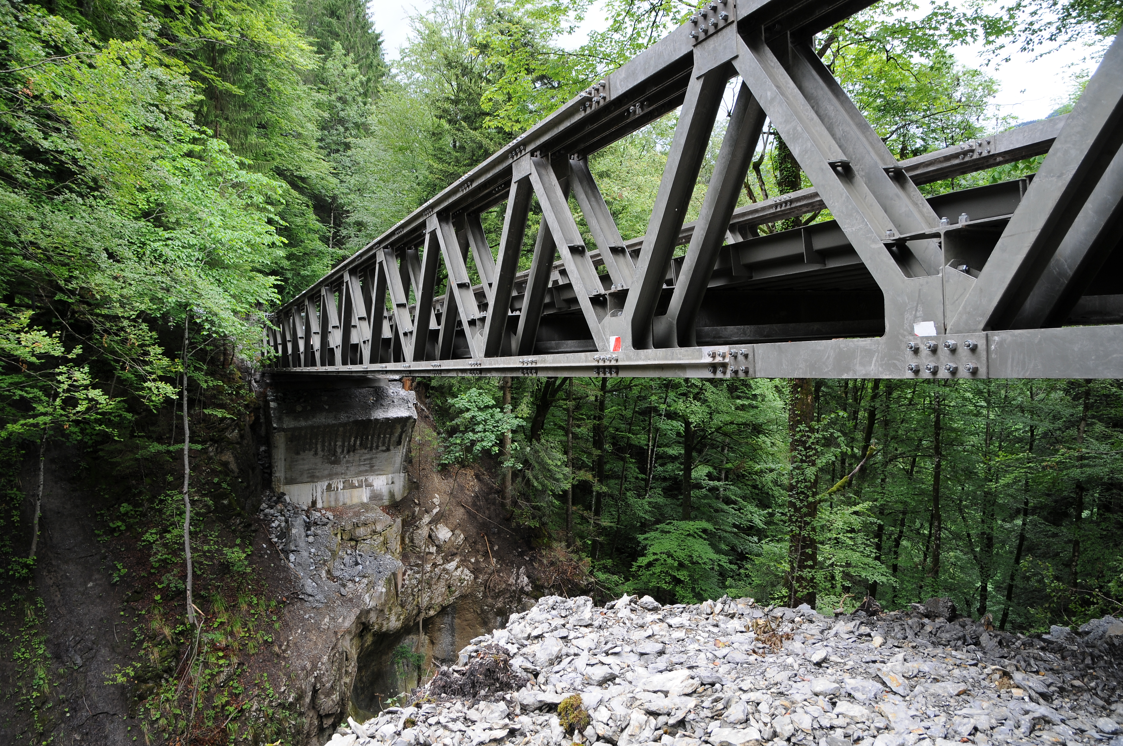 Am 10. Mai 2011 stürzte die Rappenlochbrücke infolge eines Felssturzes unter der Brückenauflage ein. Die Pionierkompanie (gebbwgl)/PiB2 des Österreichischen Bundesheeres errichtete mit ca. 70 Pionieren und Offizieren hier eine Krupp-D-Brücke.